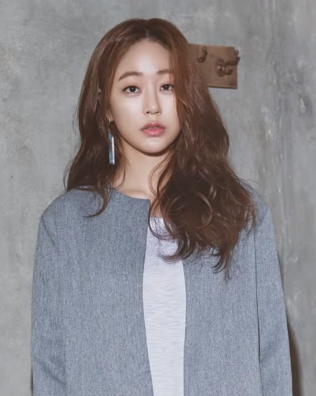 Marie Claire Korea 김효진의 Cozy Scenes